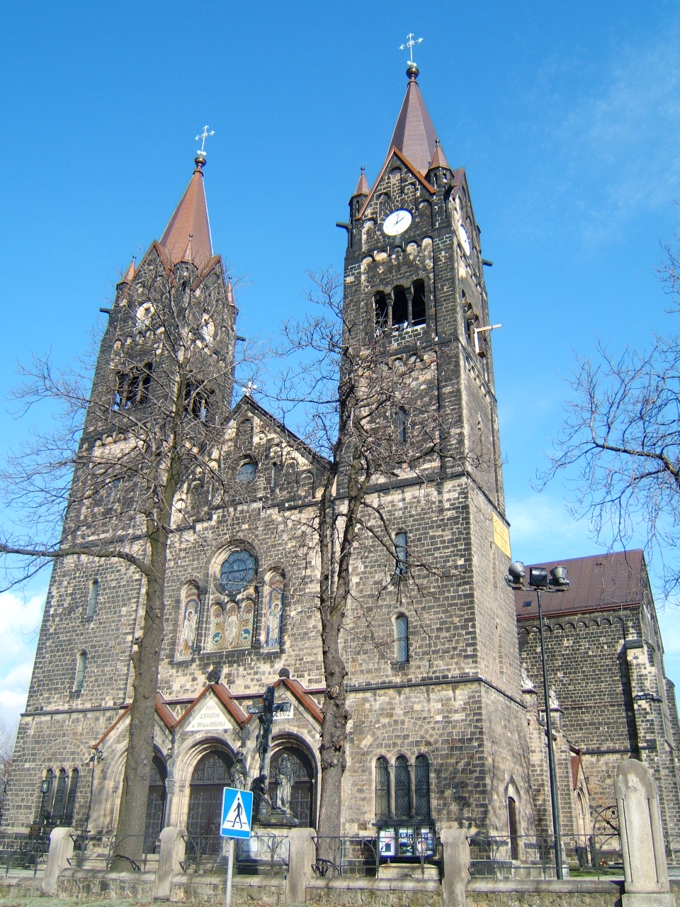 Kościół Trójcy Św. w Kochłowicach